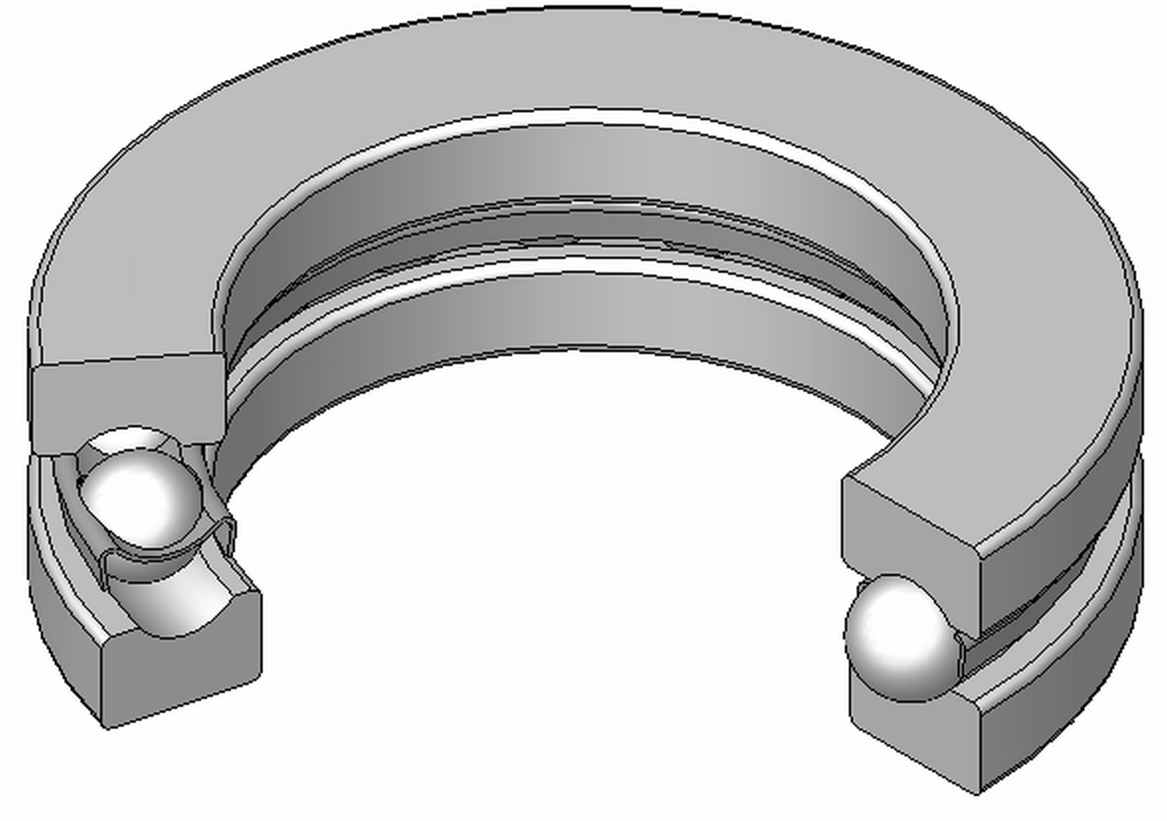 Axial-Rillenkugellager, Blechkaefig aus Stahl, zerlegbar, 120°Schnitt, Hinweis: Innenaufbau des Lagers (insbesondere des Kaefigs) variiert je nach Hersteller und Baugroesse rolling contact bearings